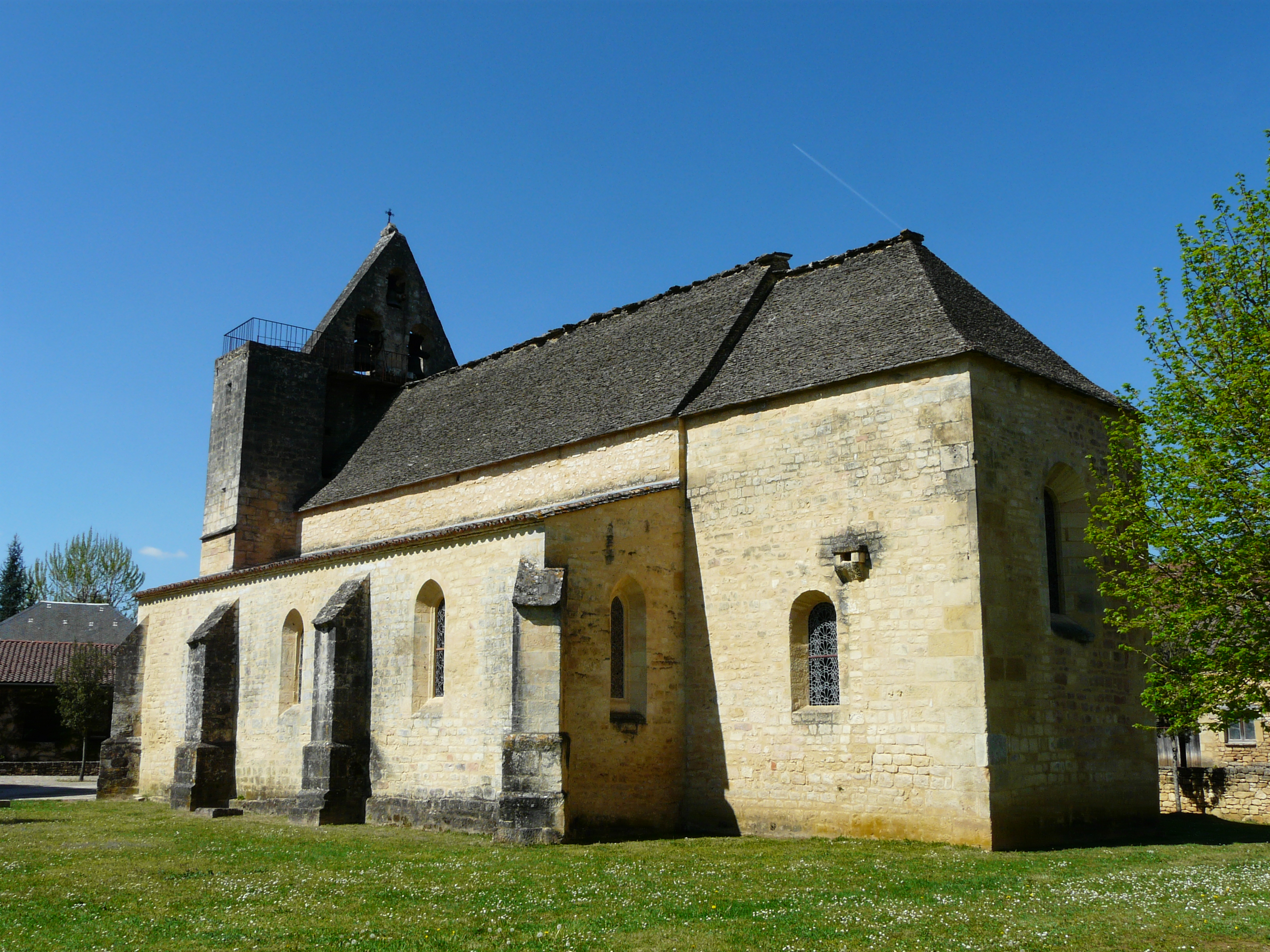 L'église Sainte-Nathalène vue du sud, Sainte-Nathalène, Dordogne, France.